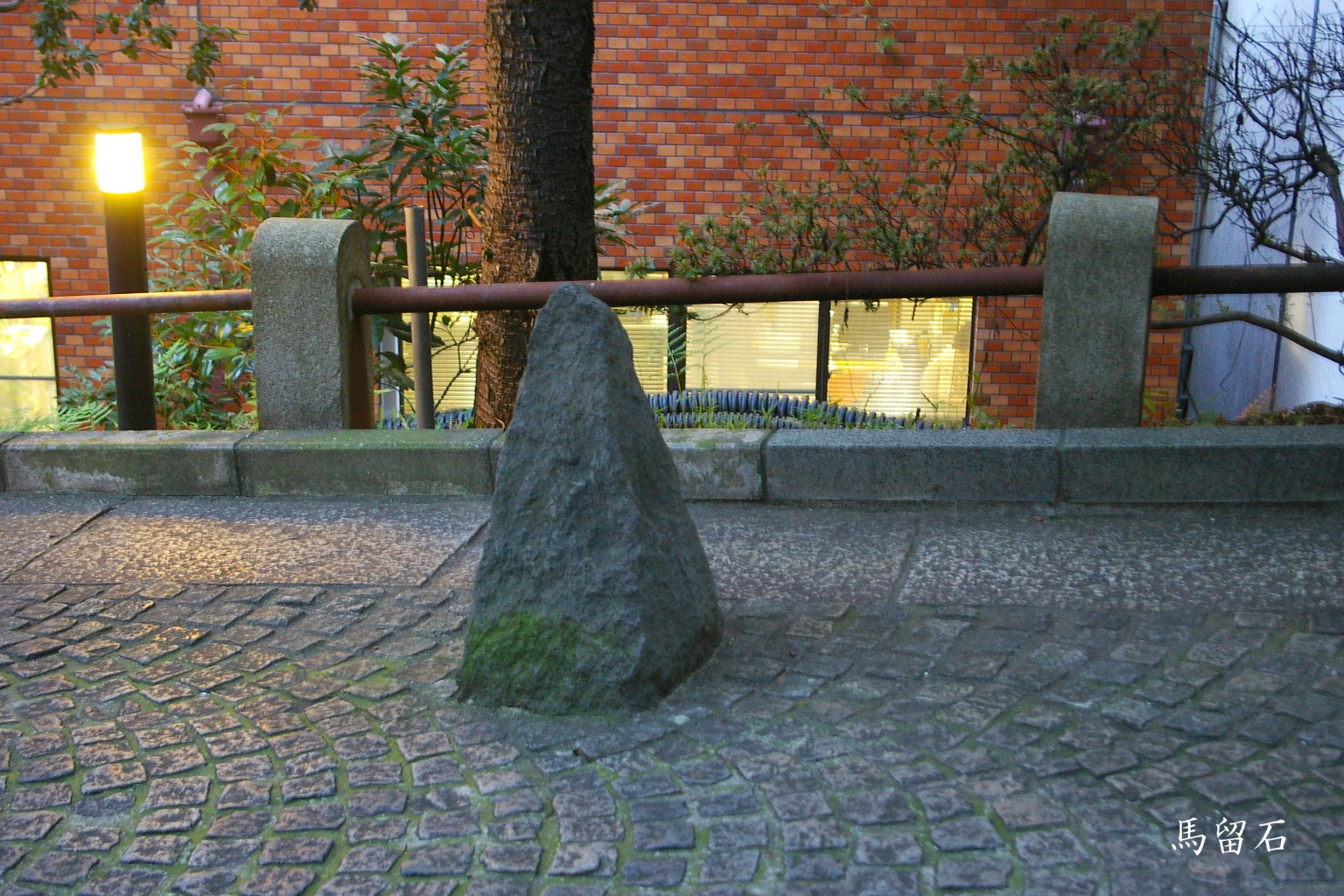 2009.5日本国内で塾生 (talk)が撮影。